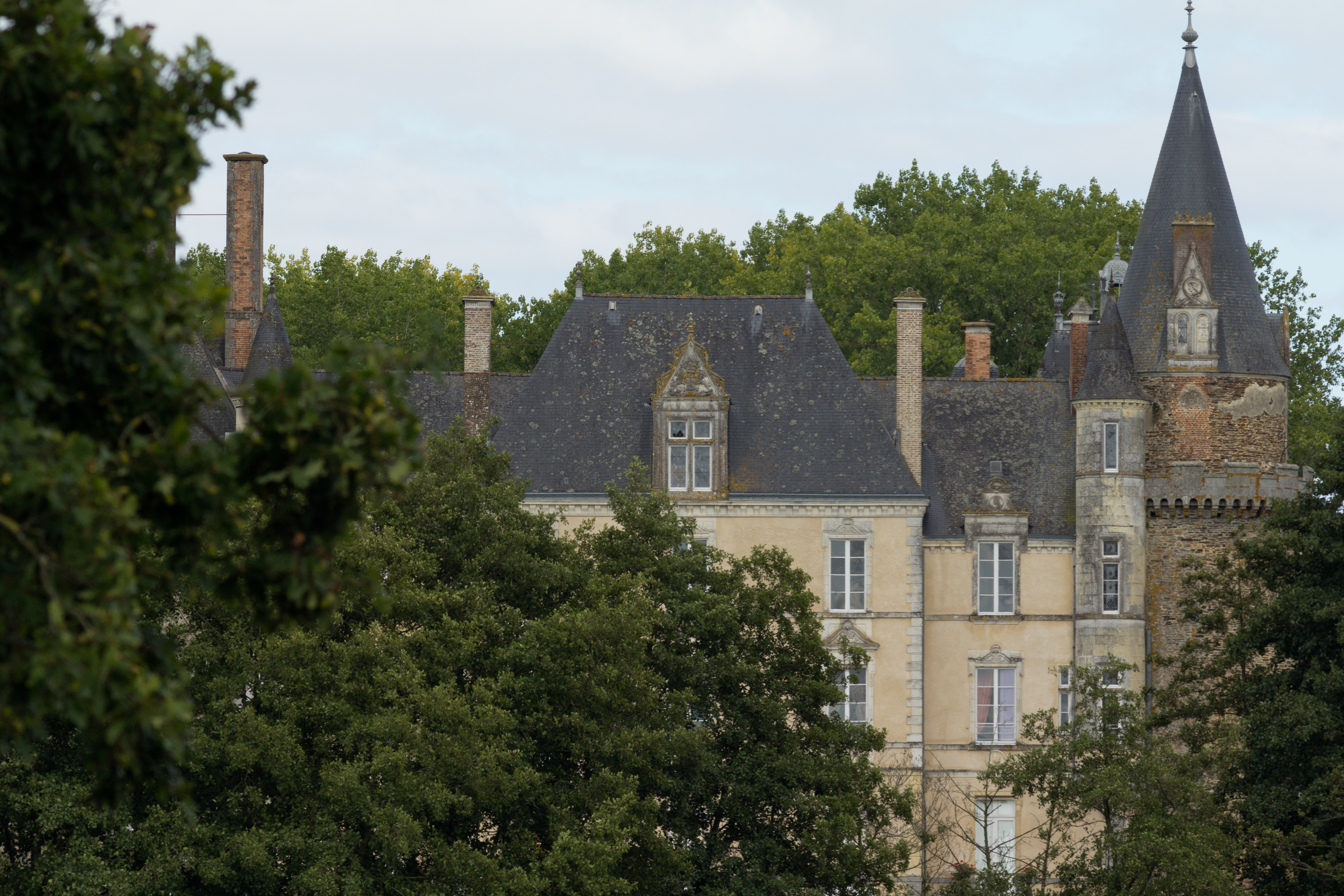 Argentré-du-Plessis (Ille-et-Vilaine, France) : Le château du Plessis ; la tourelle de briques forme l'extrémité de l'aile est du château. Le toit de la chapelle est visible derrière celui de la tourelle.